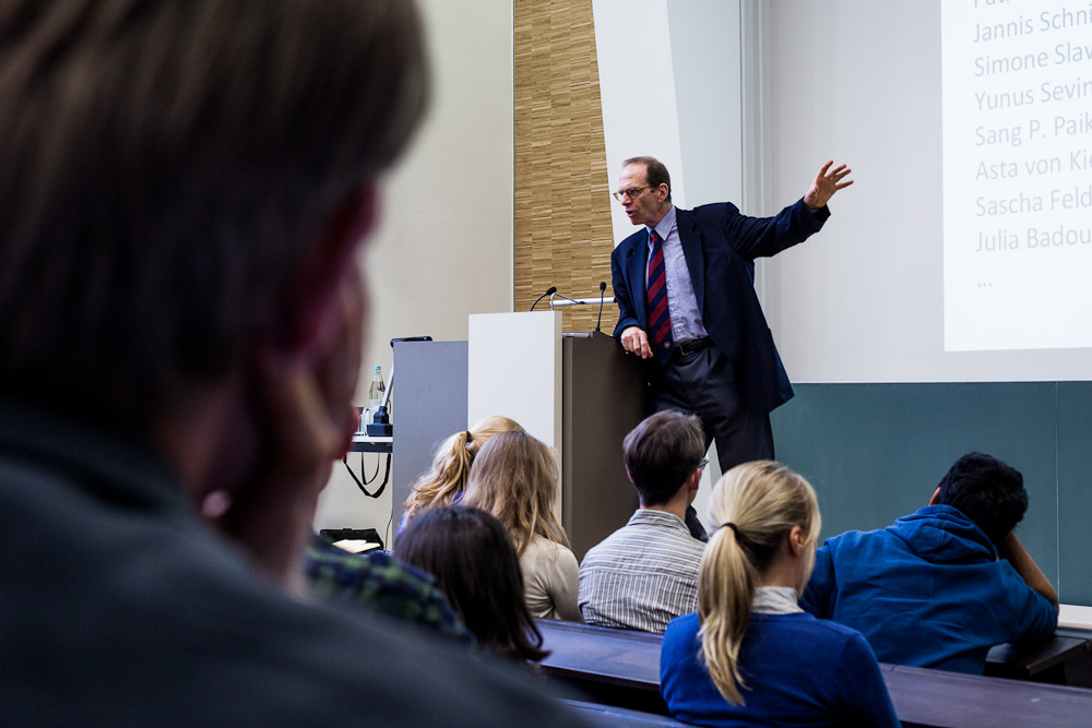 Prof. Reinhard Zimmermann bei einem Vortrag.